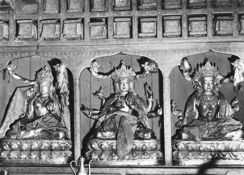 Tibetexpedition, Statuen Lhasa, Götterfiguren im Kloster Serra